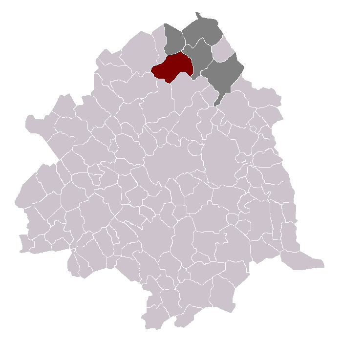 Linselles dans son canton et son arrondissement